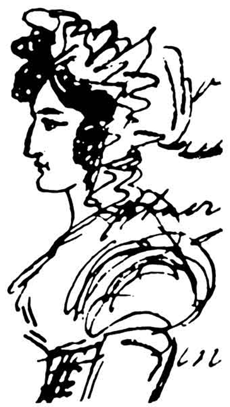 Княжна Александра Александровна Римская-Корсакова (1803—1860)